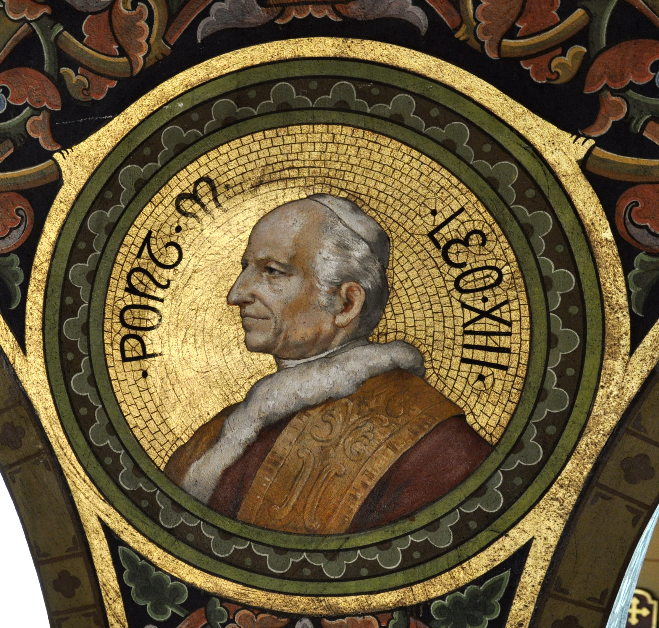 Kloster Mehrerau, Bregenz, Vorarlberg; Collegiumskapelle; Bildnisse von Päpsten (in den Arkadenzwickeln) und zugehörige Wappen; Leo XIII.